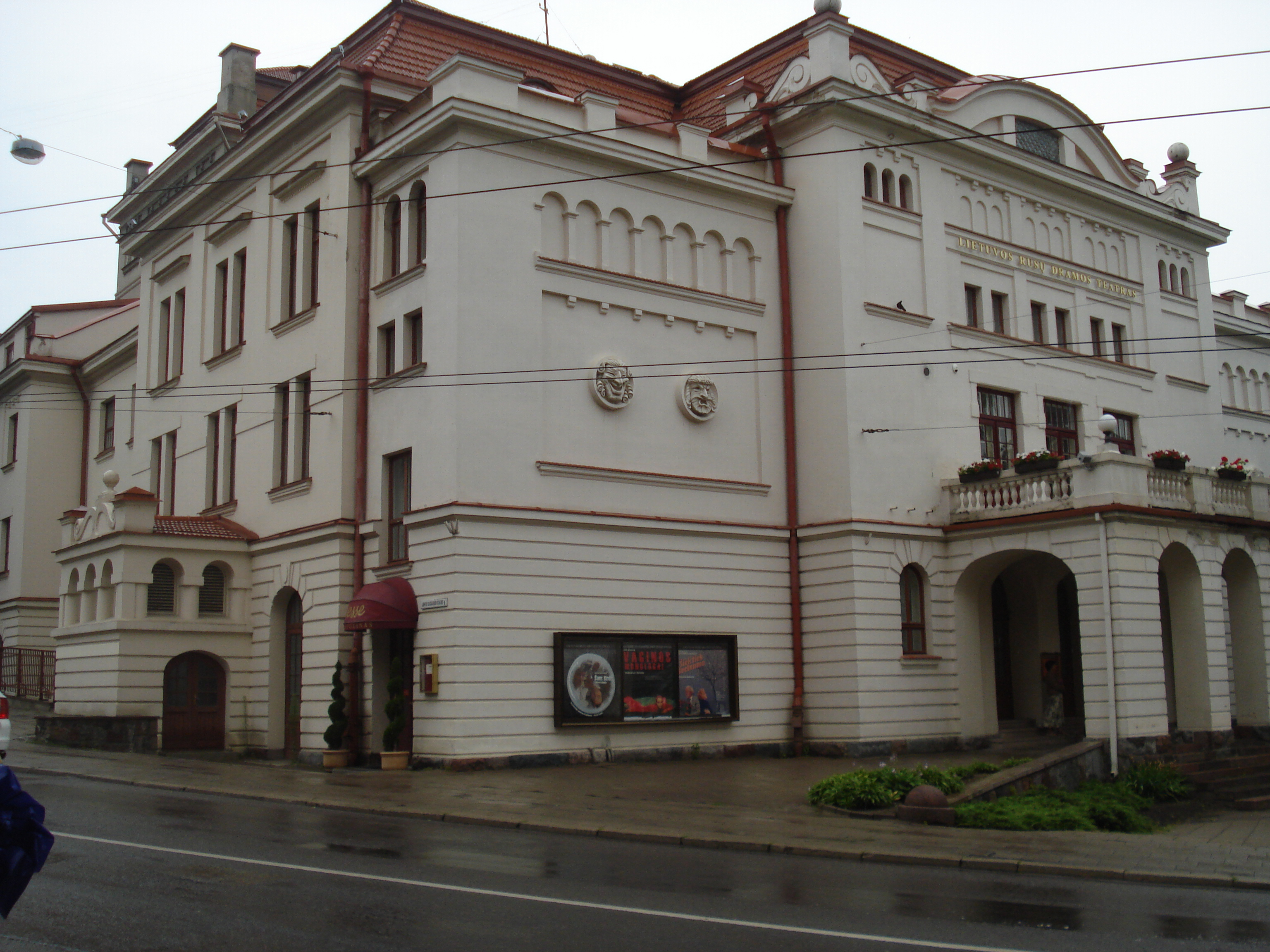 Russian Drama Theatre in Vilnius (J. Basanavičiaus g. 13)